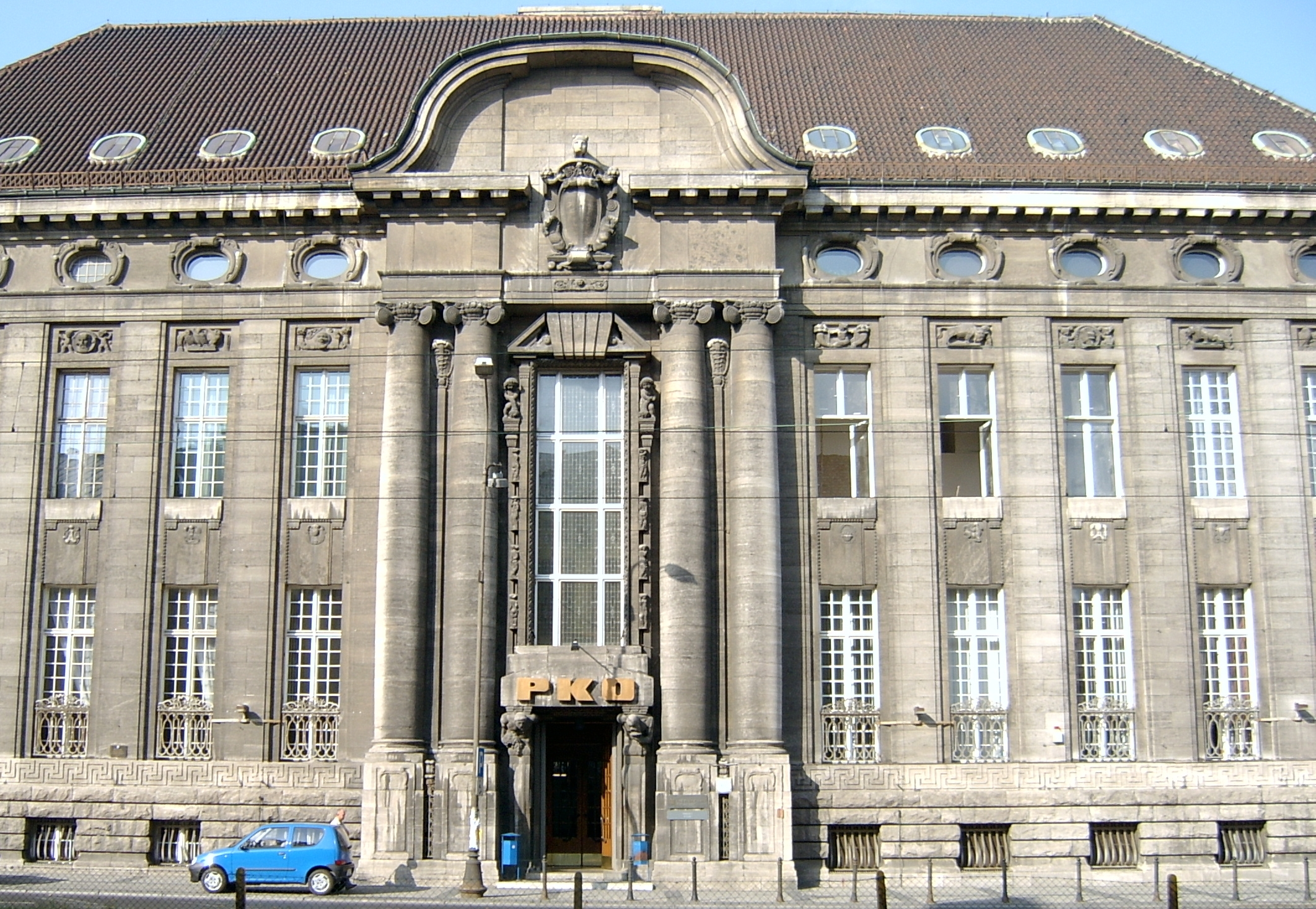 Łódź Bank przy ulicy Tadeusz Kościuszki 15. Wnętrza banku "zagrały" wnętrza Domu Bankowego Kramera w filmie "Vabank".